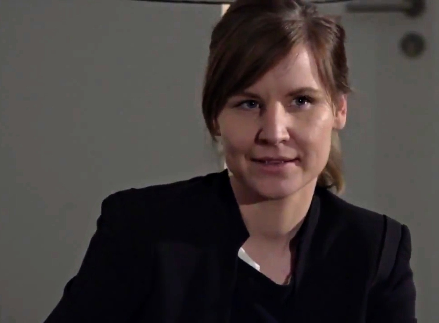 Früh in den Feierabend, schnell einen Drink in der nächsten Bar, aber per Smartphone rund um die Uhr erreichbar bleiben? Baby Boomer, Generation X, Y und Z: Vier Generationen – ein Arbeitsplatz und alle haben verschiedene Ansprüche und Vorstellungen von unserer Arbeitswelt. Dabei ermöglicht das Internet neue Organisationsformen; die Innovationsfähigkeit der Crowd tritt in den Wettbewerb mit klassischen Unternehmenshierarchien und Firmen setzen auf externe Partner und Prosumenten statt auf unbefristete Festanstellungen. In diesem Digitalen Salon wollten wir wissen, ob Unternehmer heutige Erwartungen – nach Stabilität, Eigenverantwortung und Arbeiten am Strand – aller Generationen vereinen. Welche Rolle spielt dabei die durch Technologien und Internet geschaffene Flexibilität bis hin zu Bonuszahlungen für social freezing? Welche Chancen und Risiken bieten diese Herausforderungen und wie können wir uns auf die virtuelle Arbeitswelt vorbereiten? DIGITALER SALON | FEIERABEND 4.0 24.02.2016 | 19.00 Uhr | Auditorium des Jacob-und-Wilhelm-Grimm-Zentrum der Humboldt Universität zu Berlin | Geschwister-Scholl-Str. 3 | 10117 Berlin Katja Weber von DRadio Wissen diskutierte mit: Catharina Bruns, Autorin und Gründerin, workisnotajob Carlos Frischmuth, Director Contracting, Hays Max Neufeind, Policy Fellow, Das Progressive Zentrum Eine Einführung zum Thema gab Stefan Stumpp, assozierter Doktorand des Alexander von Humboldt Institut für Internet und Gesellschaft. Mehr Infos